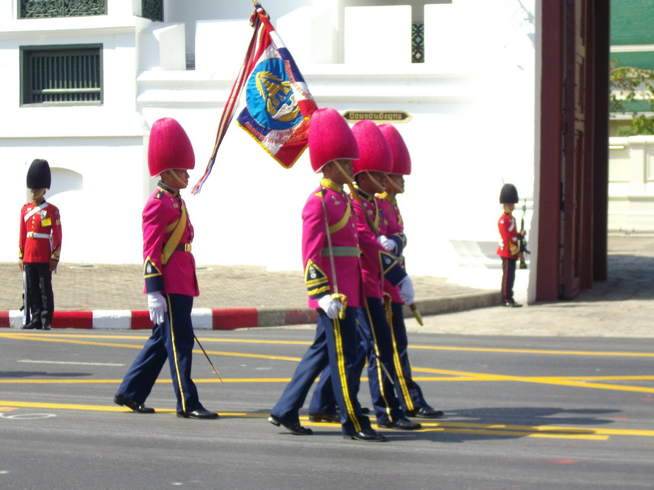 หมู่เชิญธงชัยเฉลิมพลของกองพันทหารอากาศโยธินที่ 1 รักษาพระองค์ ในริ้วกระบวนเชิญพระศพสมเด็จพระเจ้าพี่นางเธอ เจ้าฟ้ากัลยานิวัฒนา กรมหลวงนราธิวาสราชนครินทร์ ริ้วกระบวนที่ 2 หน้าพระที่นั่งสุทไธสวรรยปราสาท ถนนสนามไชย วันที่ 15 พฤศจิกายน พ.ศ. 2551